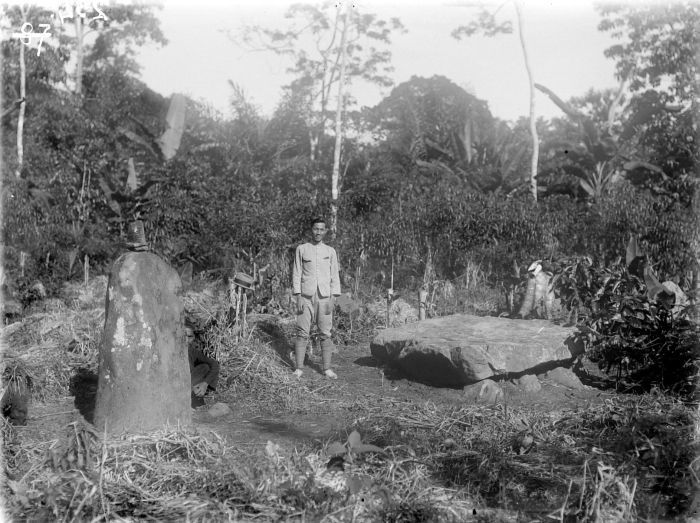 Negatief. Man poseert tussen megalieten bij Batoeberak